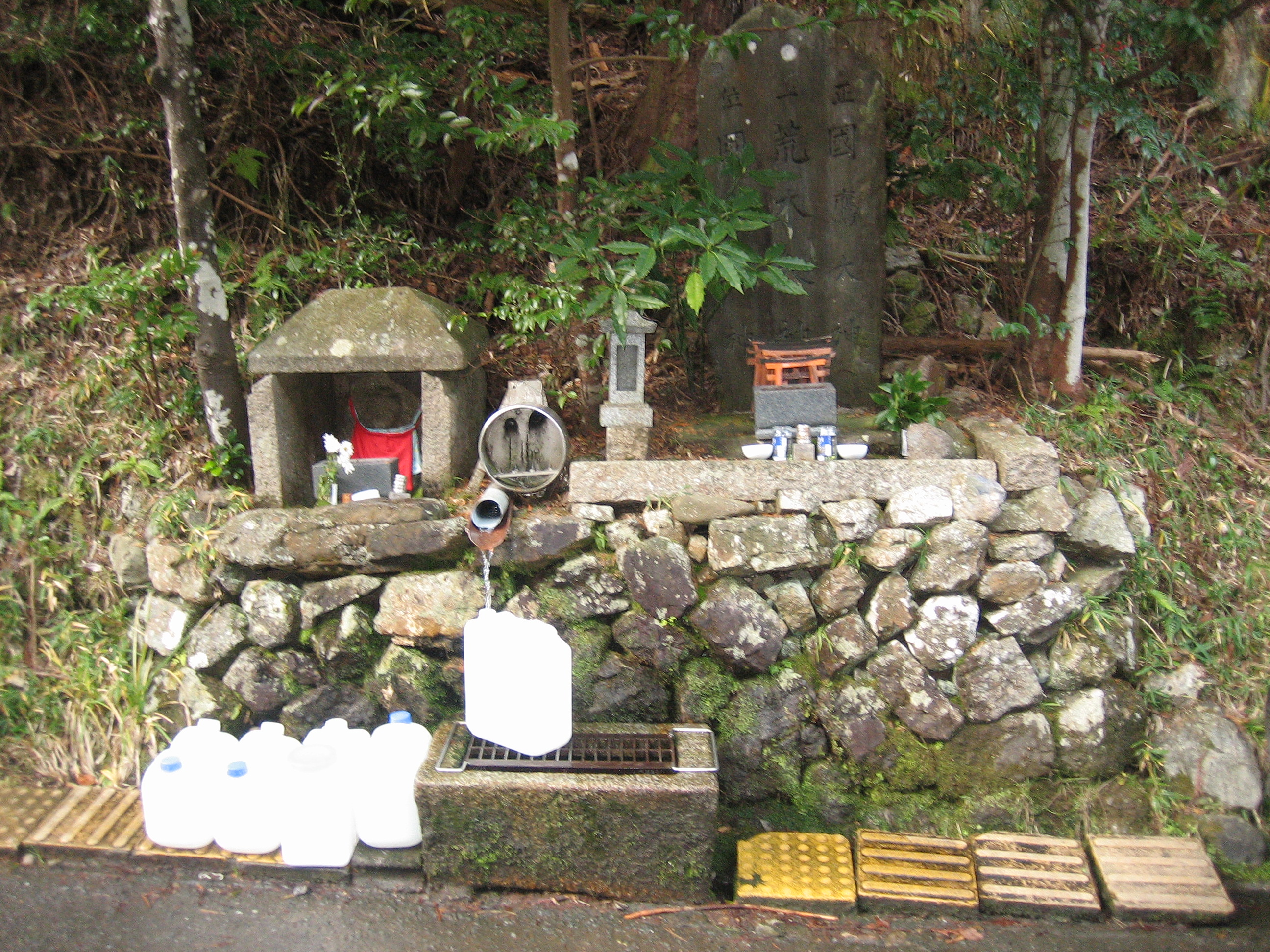 杉阪の舟水を京都市北区鷹峯船水から撮影